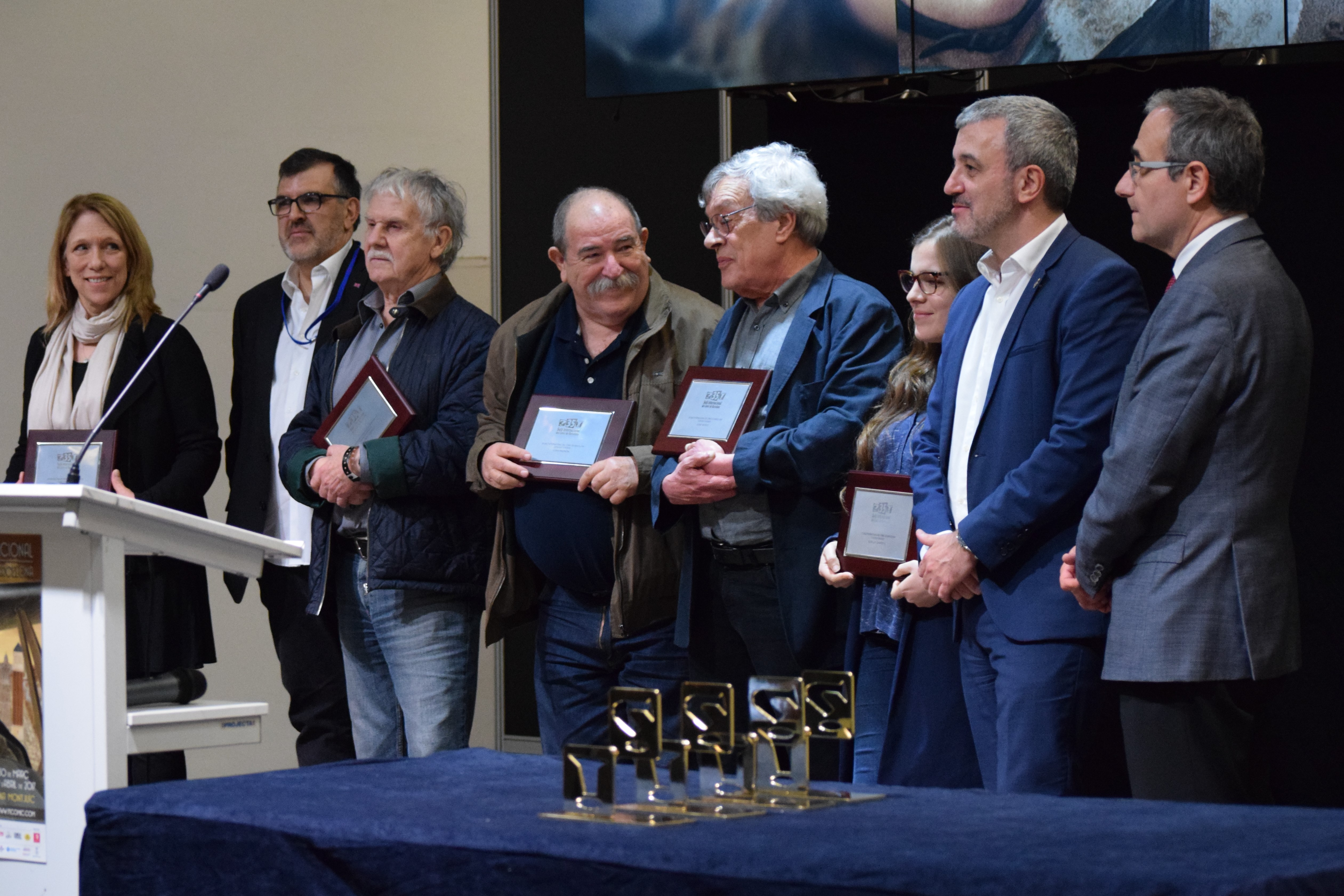 Tots els autors homejetajts per Ficomic. D'esquerra a dreta: Liza Donnelly, Carles Santamaría (director del Saló), Hermann, Juan Padrón, José Muñoz, filla de Carlos Sampayo (el seu pare va obtenir un premi honorific), Jaume Collboni (tinent d'alcalde de Barcelona) i Patrici Tixis. Saló Internacional del Còmic de Barcelona de 2017. Divendres 31 de març de 2017.